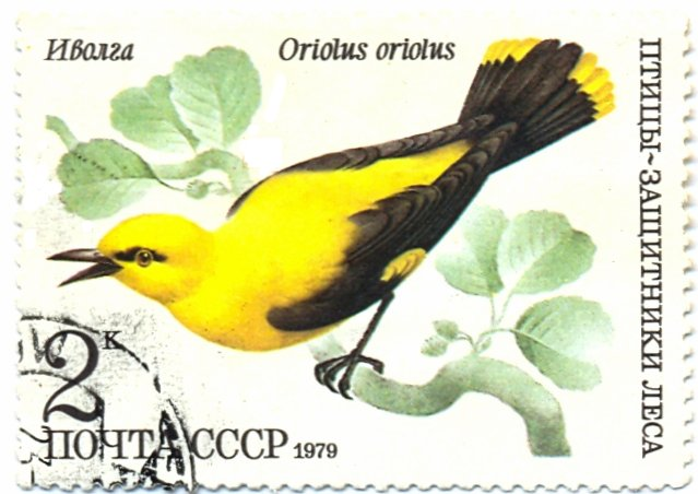 Почтовая марка с изображением обыкновенной иволги (1979 год)